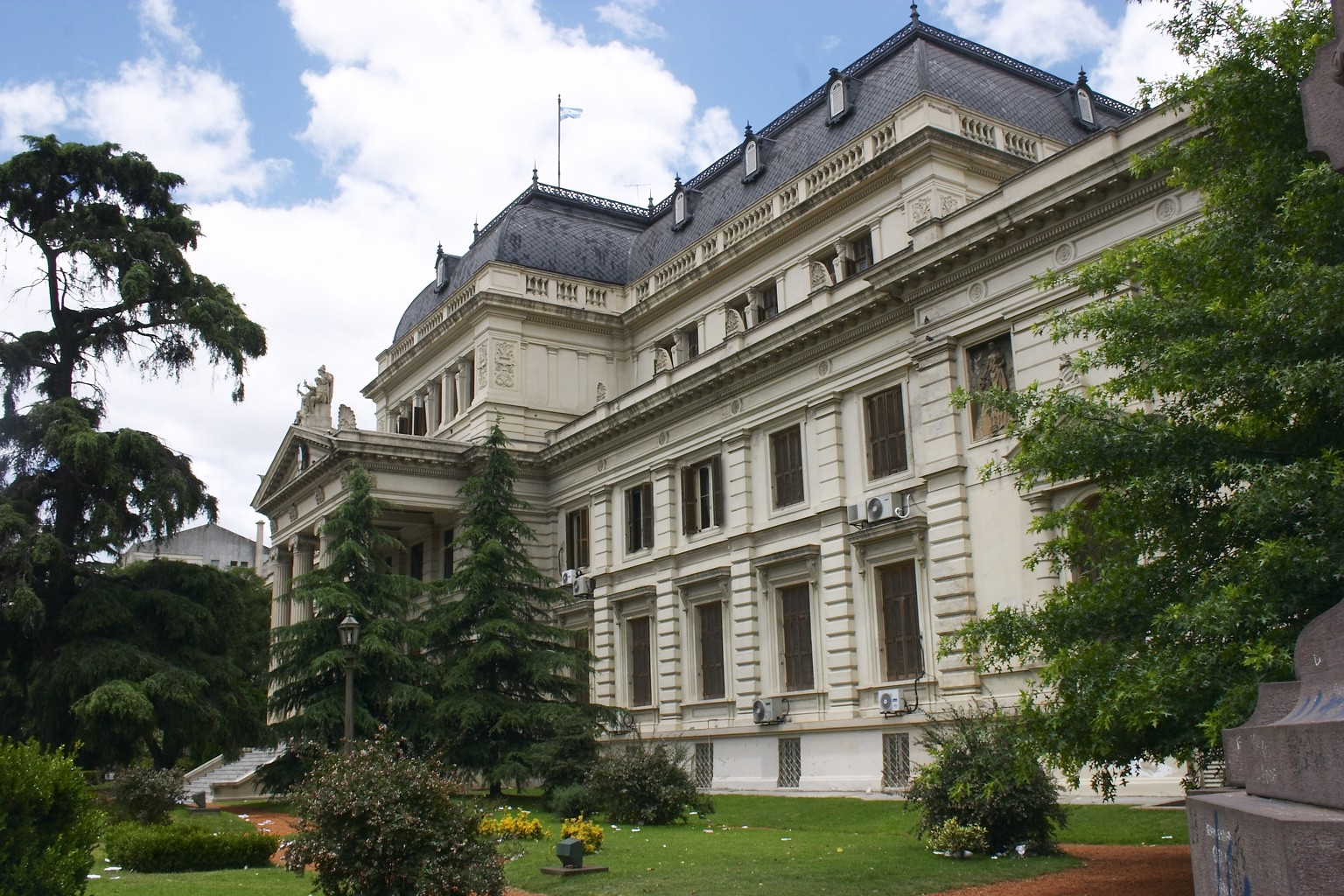 Legislatura de la Provincia de Buenos Aires, en La Plata, Argentina. Puerta principal sobre calle 7.